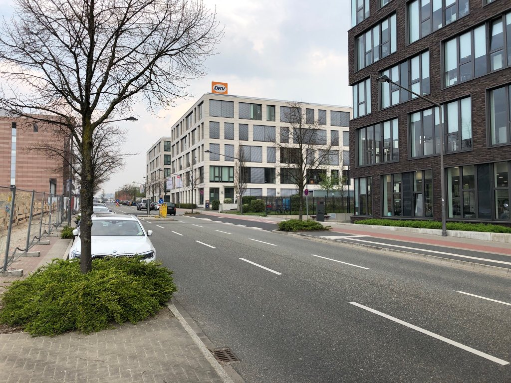 DKV EURO SERVICE GmbH + Co. KG Balcke-Dürr-Allee 3 40882 Ratingen Tel.: +49 2102 5518-0 Fax: +49 2102 5518-192 Registergericht Düsseldorf HRA 4053 vertreten durch die Verwaltungsgesellschaft EGRIMA mbH Registergericht Düsseldorf HRB 1703 Geschäftsführung Marco van Kalleveen, Dr. Werner Grünewald, Sven Mehringer, Markus Präßl DKV USt. ID-Nr. DE 119 375 450